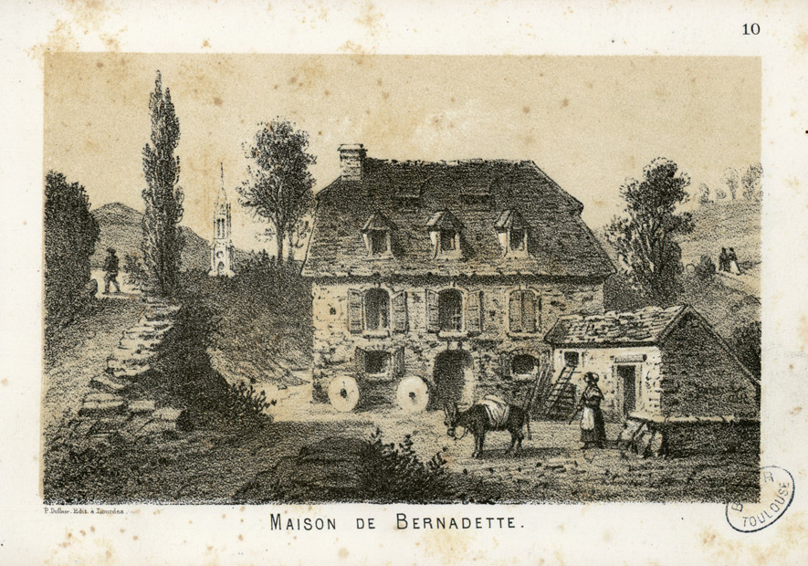 Fait partie d'un album de 18 planches lithographiées dont certaines sont signées. Pl. imprimées chez Monrocq à Paris. Titre en lettres d'or sur le plat supérieur. Les dessins des lithographies n° 5, 6, 7, 13 paraissent signés André Gorse. L'identification est certaine car le dessin original de la lithographie n°4 est signé A. Gorse. Ancely, René (1876 - 1966). Possesseur